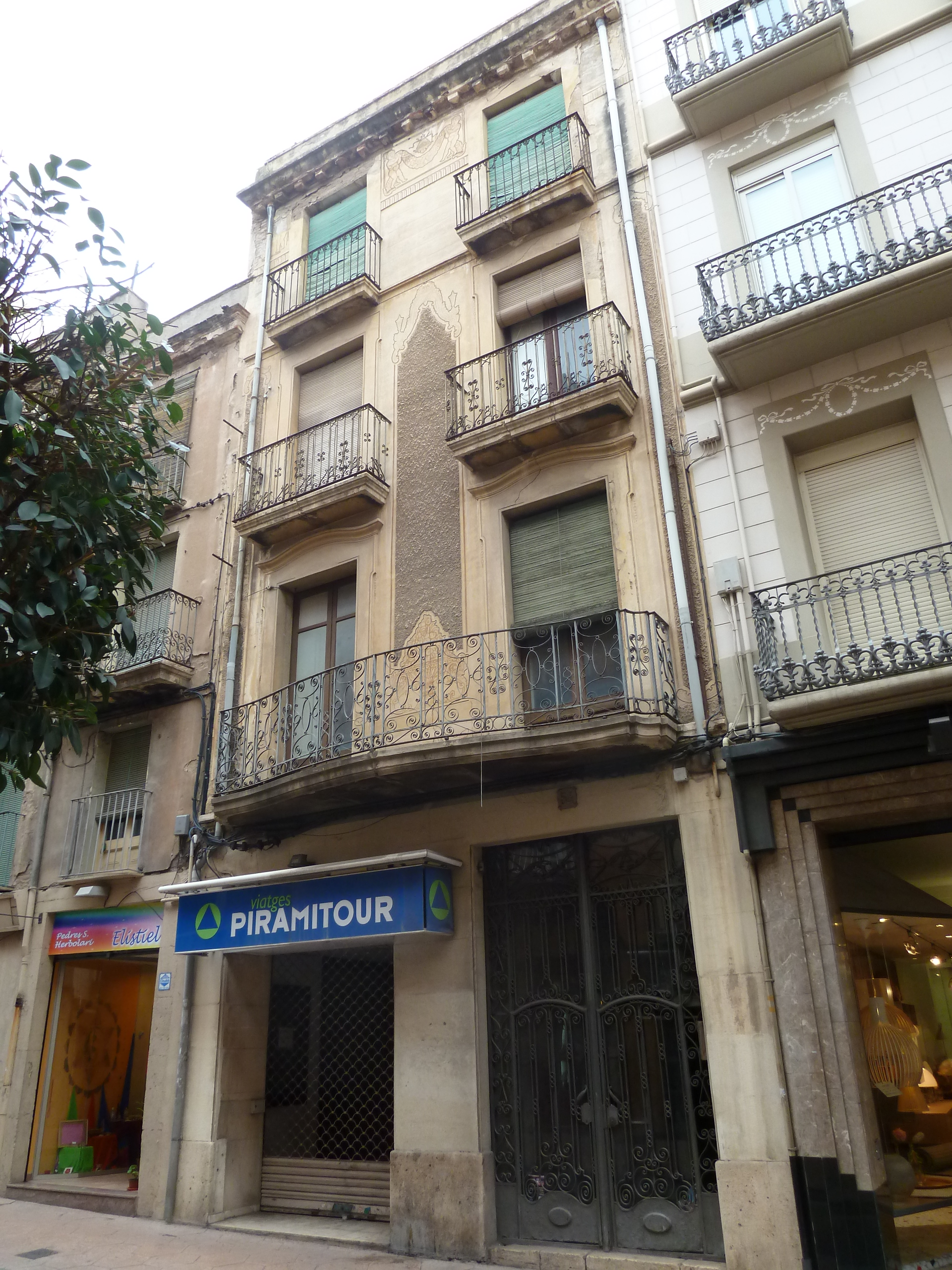 Reus